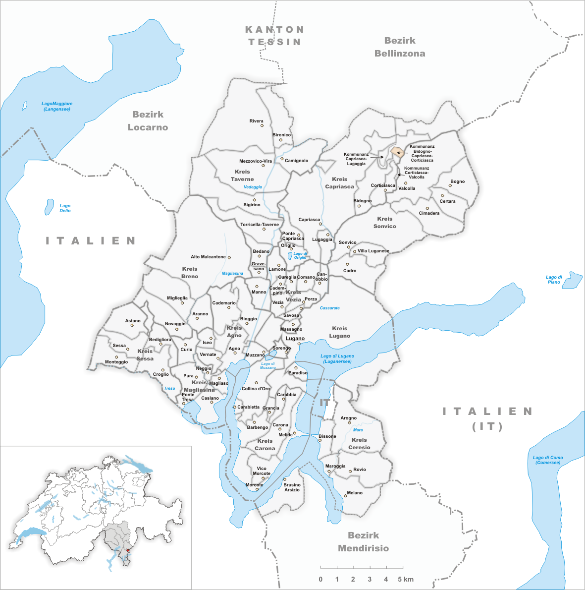 Kommunanz Bidogno-Capriasca-Corticiasca Artist: Tschubby